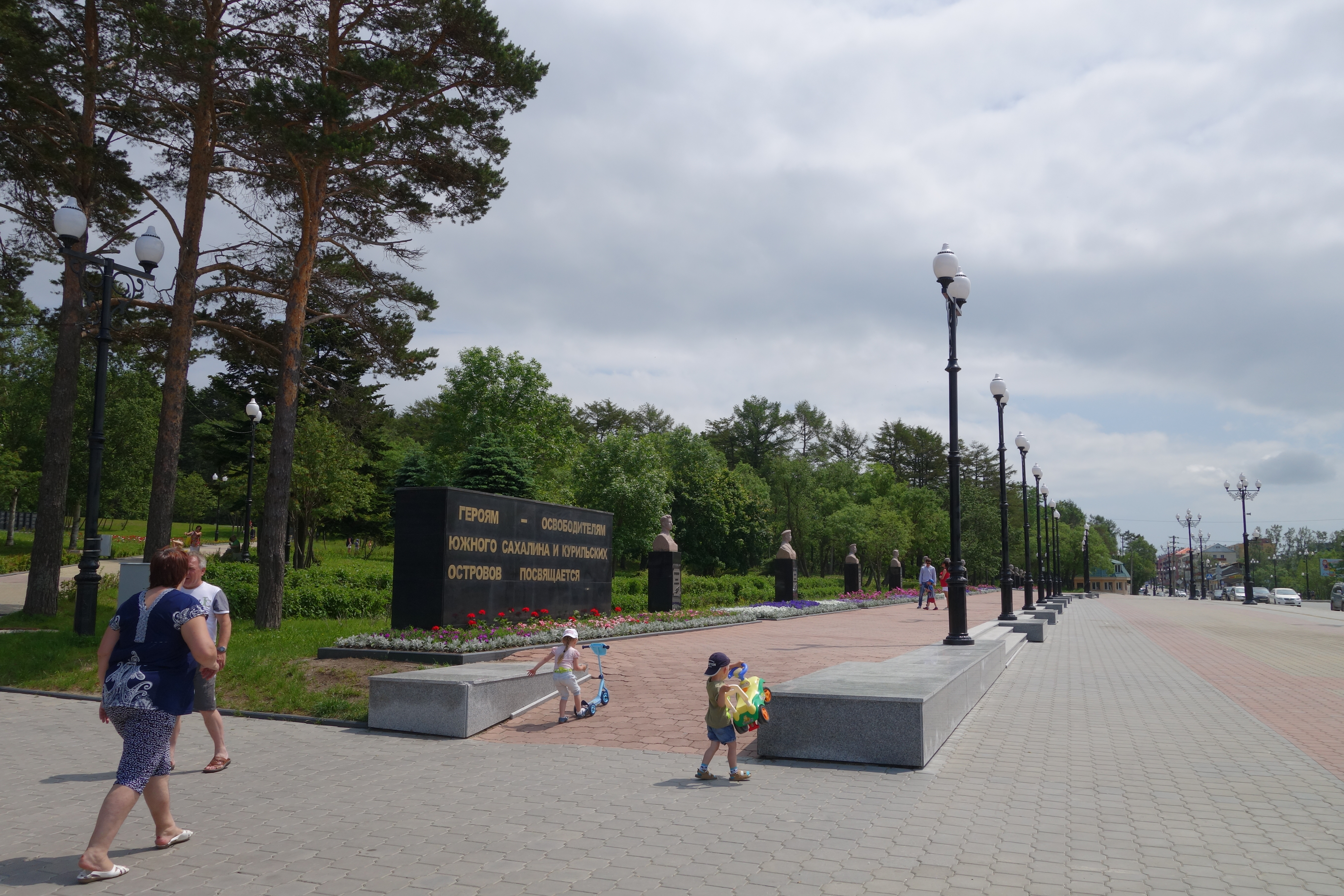 Аллея героев освобождения Южного Сахалина и Курил. Южно-Сахалинск.